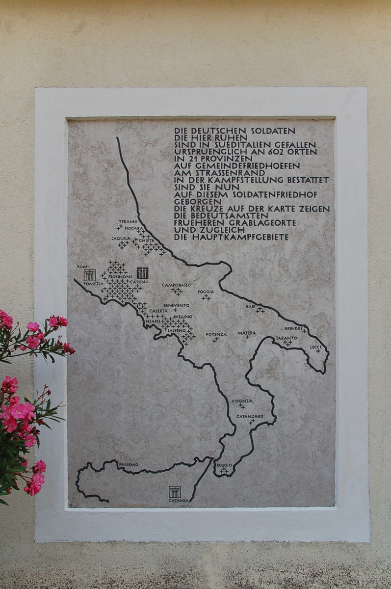 Der deutsche Soldatenfriedhof Cassino